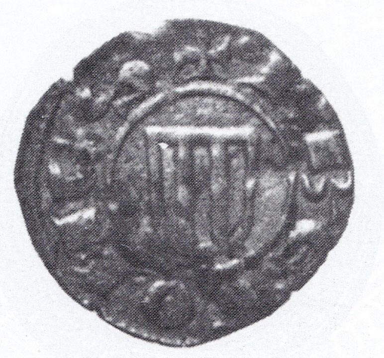 Revers de un diner de belló de Ramon Berenguer V de Provença (1209-1245) acunyat probablement a Arlés entre 1212 i 1243. Presenta un escut amb tres pals i la llegenda: + R(aimundus):B(erengarius):CO.MES